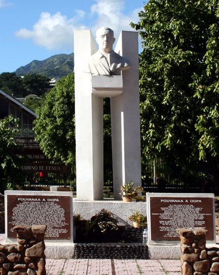 Monument de Pouvana A Oopa à Papeete